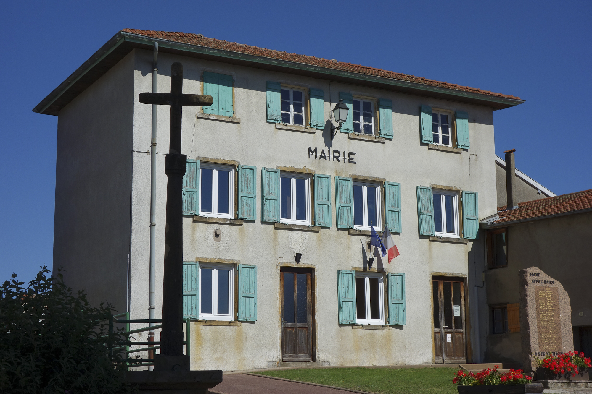 Mairie de Saint Apollinaire (69)